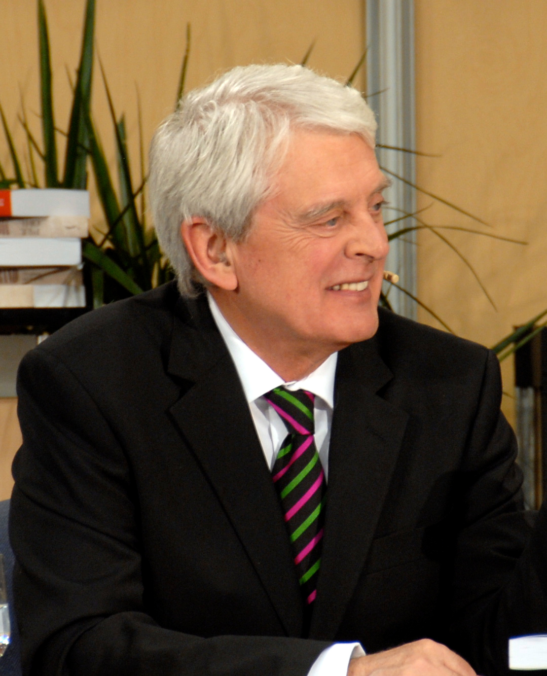 Simon Durivage, lors d'une émission du Club des ex, au Salon international du livre de Québec 2010